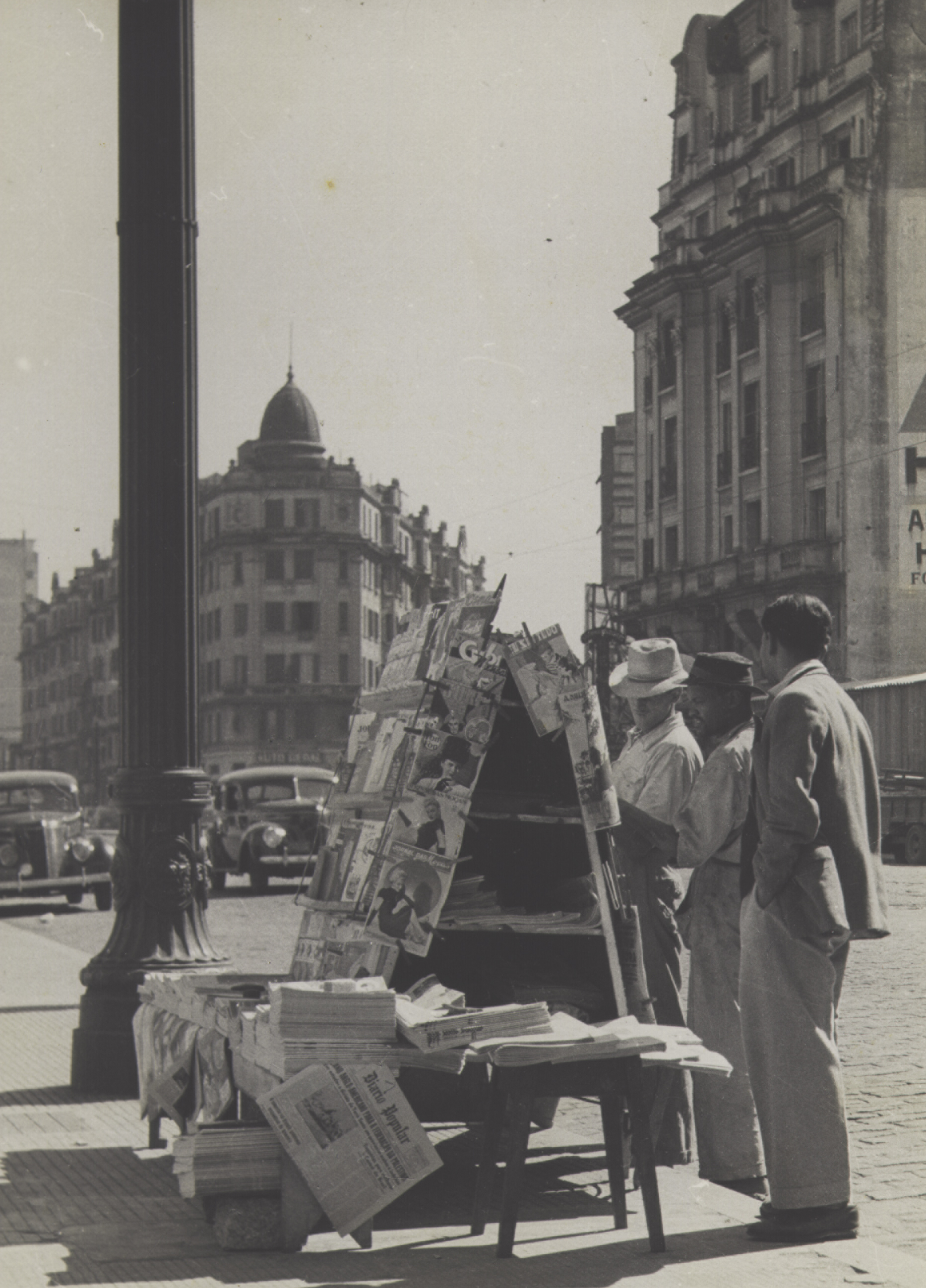 Obra que integra o acervo do Museu Paulista da USP. Coleção Werner Haberkorn